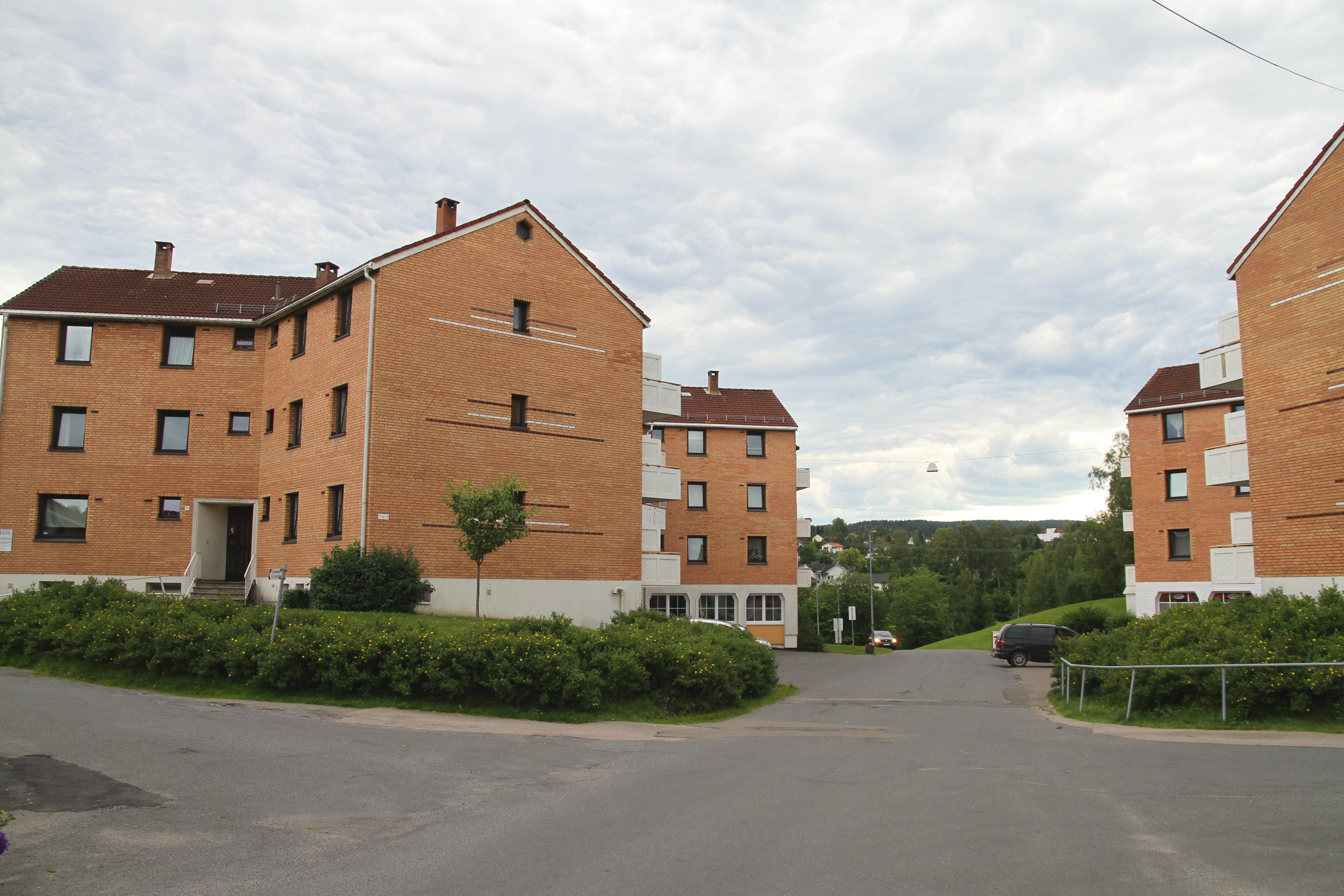 Stjerneblokkveien i Oslo.